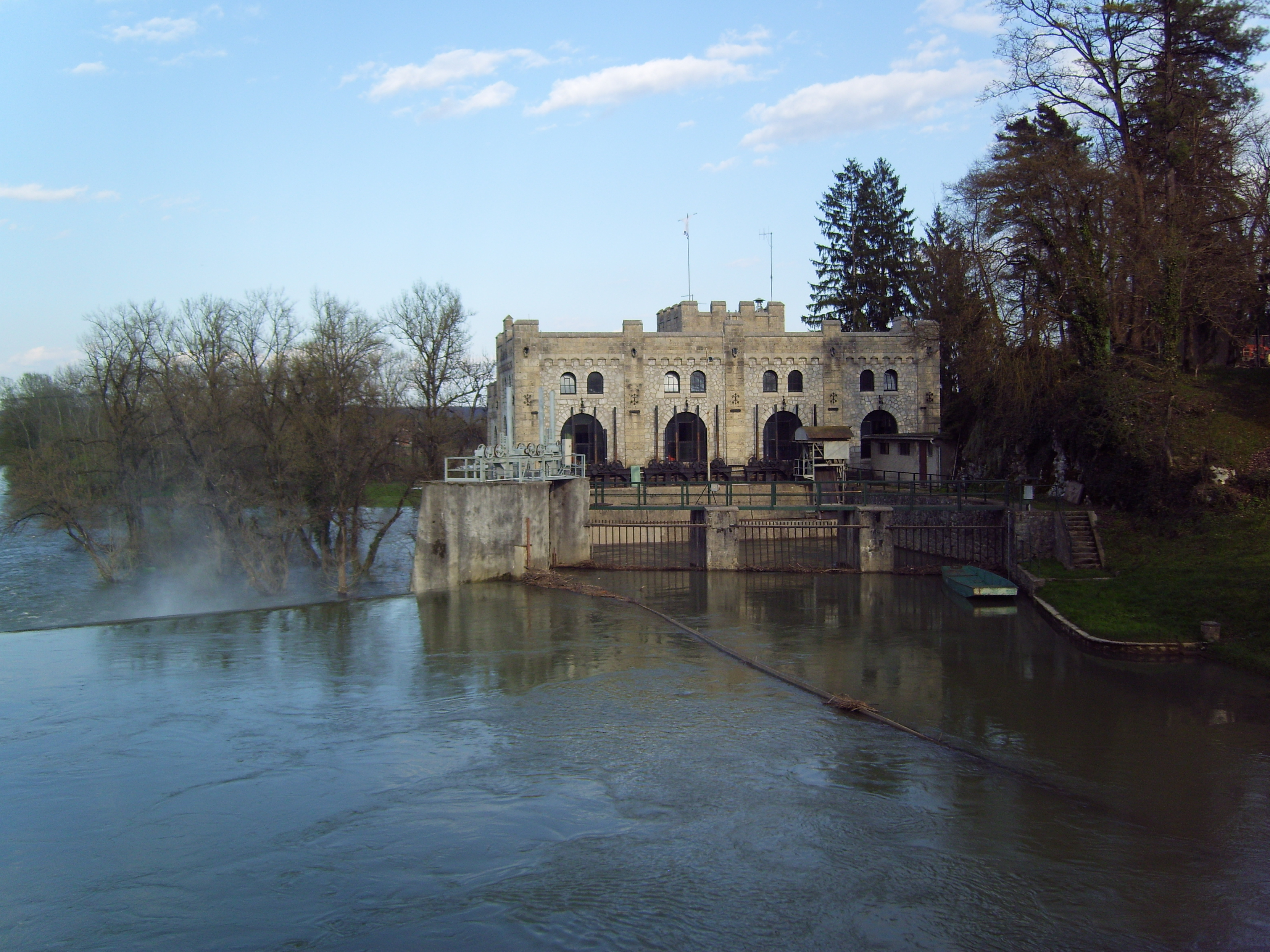 Munjara ,erbaut 1907/1908